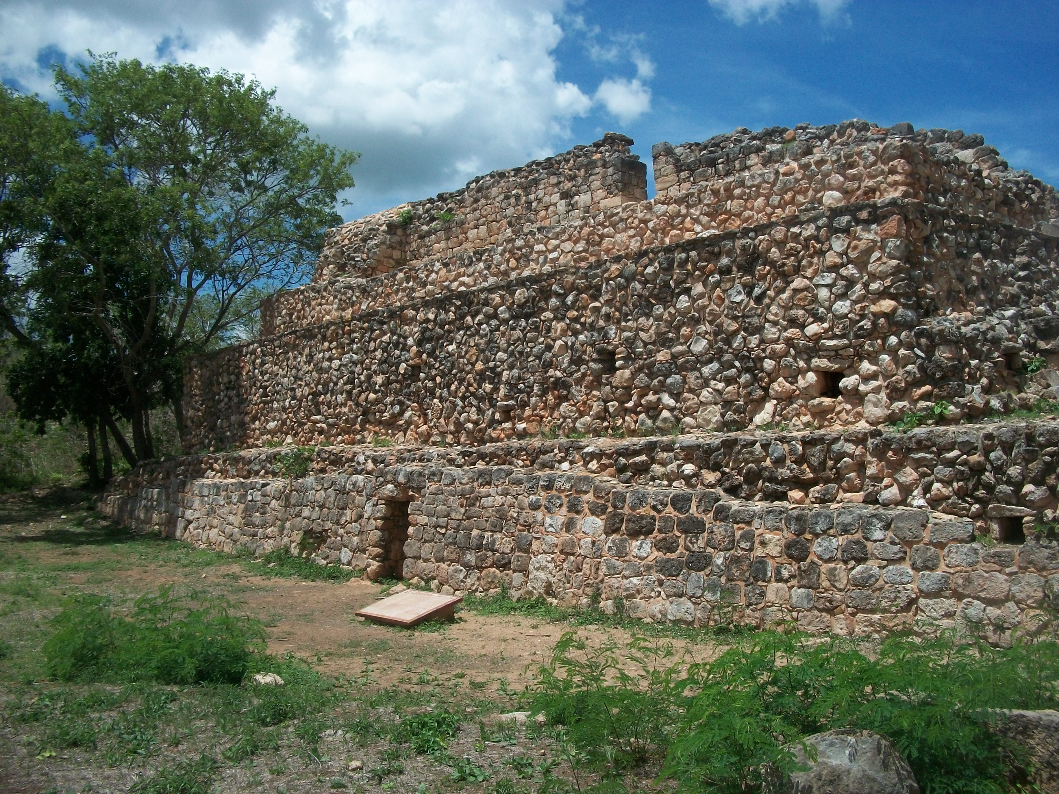 Edificio conocido como Tzat Tun Tzat o "Antiguo Laberinto", en la zona arqueológica de Oxkintok, Yucatán, México